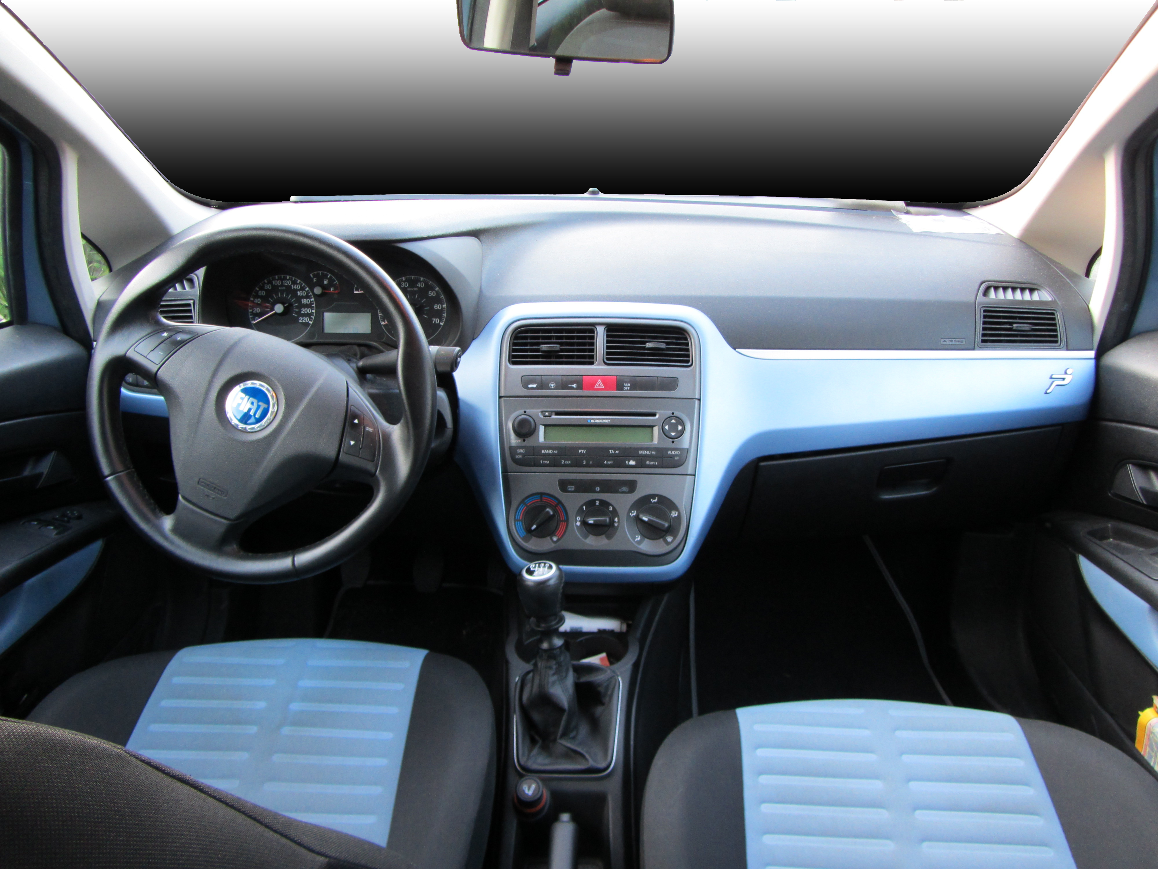 Interni di una Fiat Grande Punto